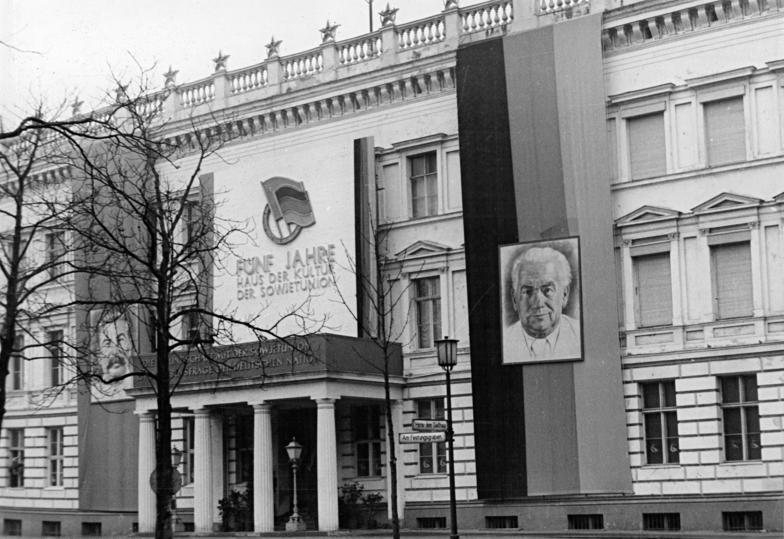 Berlin, "Haus der Kultur der Sowjetunion" ADN-ZB Gielow Berlin: Festschmuck zum 5-jährigen Bestehen des Hauses der Kultur der Sowjetunion